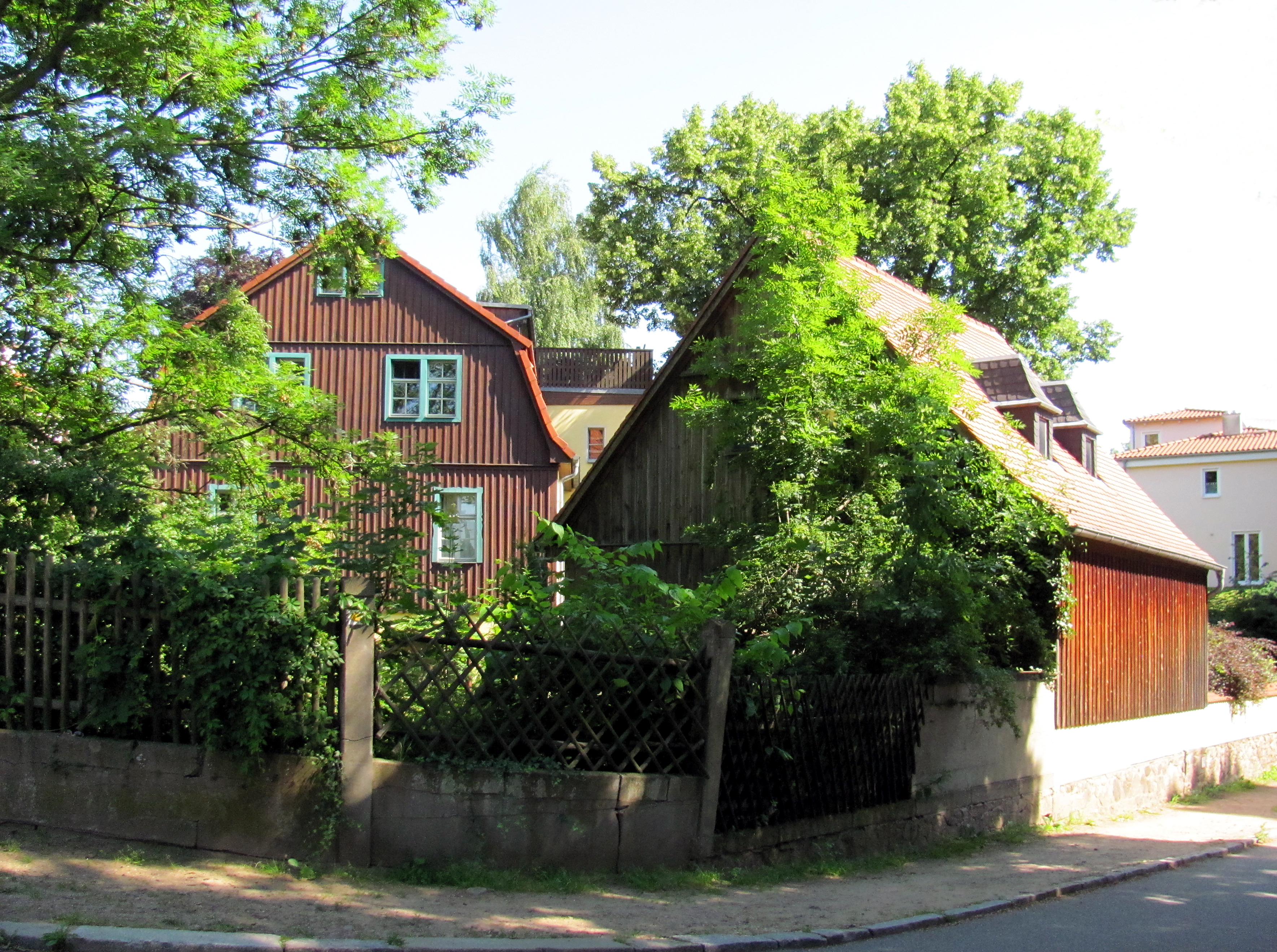 Radebeul-Oberlößnitz, Wohnhaus mit Nebengebäude Mühlweg 6